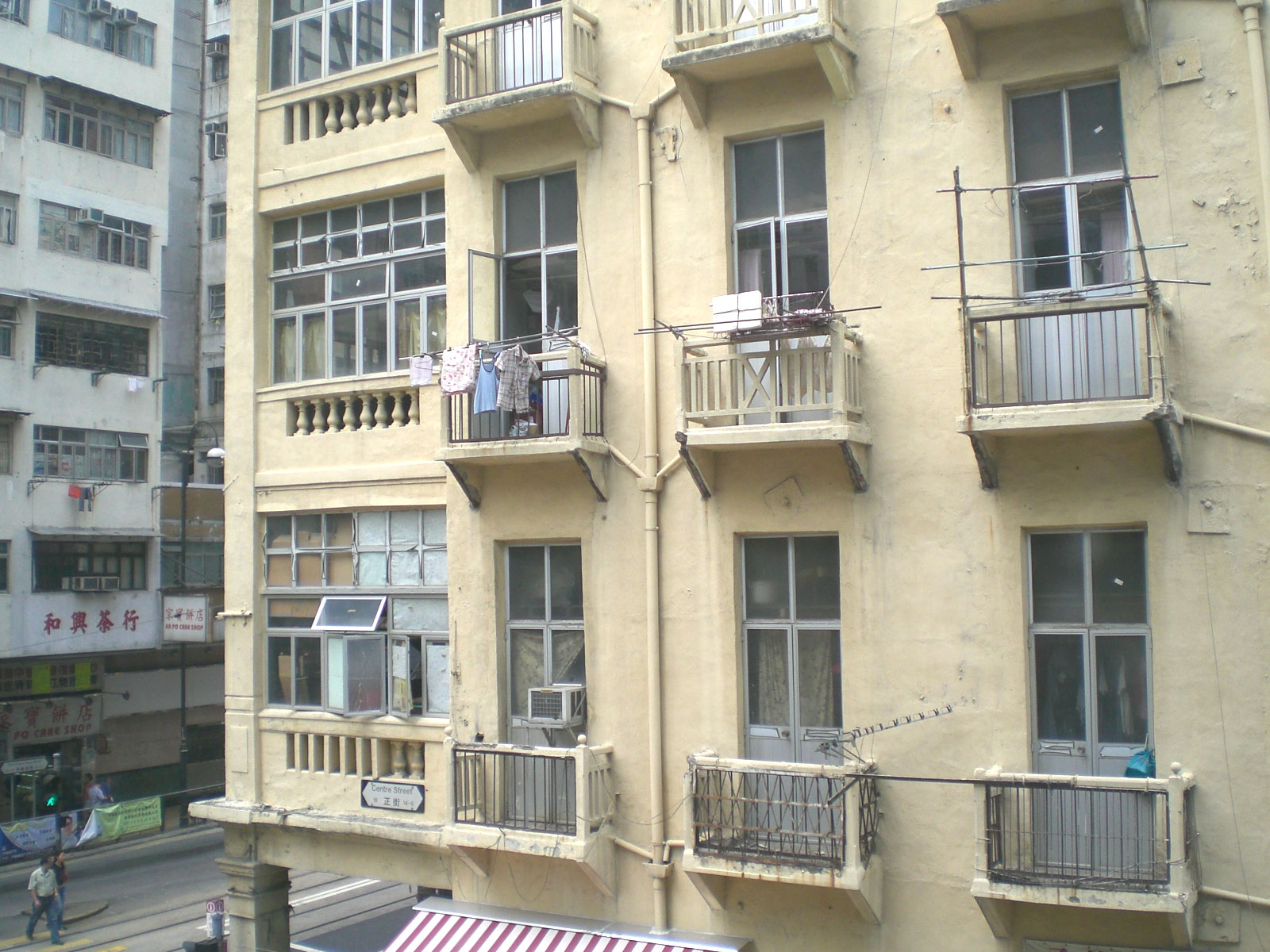 正街唐樓 Centre Street, Hong Kong 位置地圖